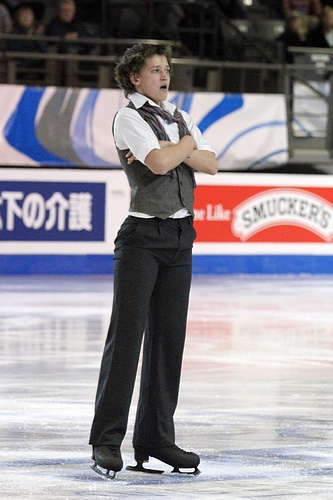 Максим Ковтун на финале Гран-при среди юниоров сезона 2011-2012